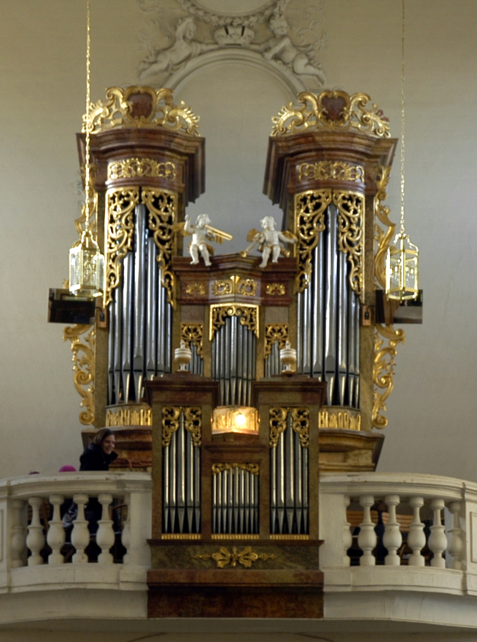 Orgel der katholischen Pfarrkirche Mariae Himmelfahrt in Ravelsbach